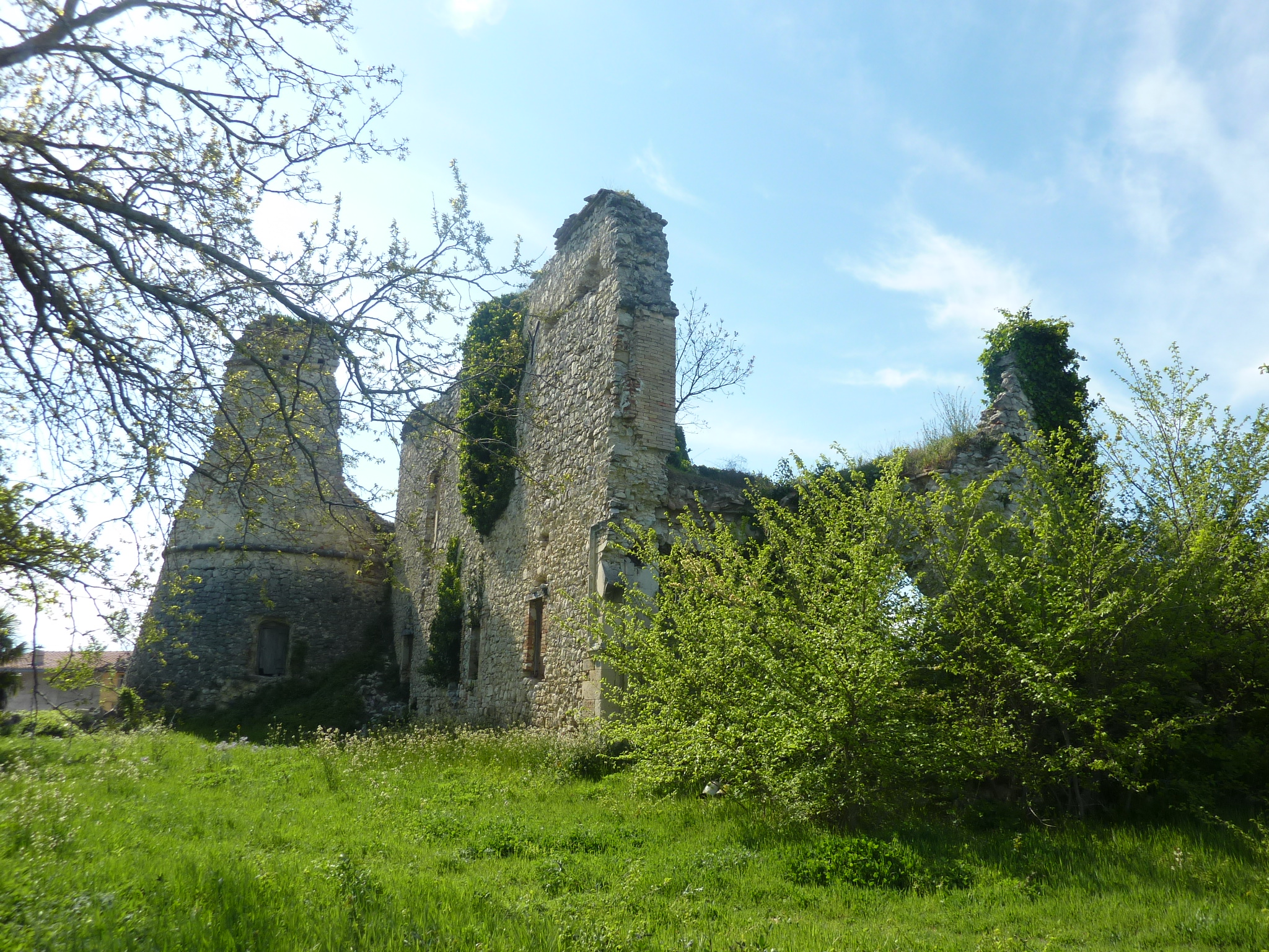 Vista del castello